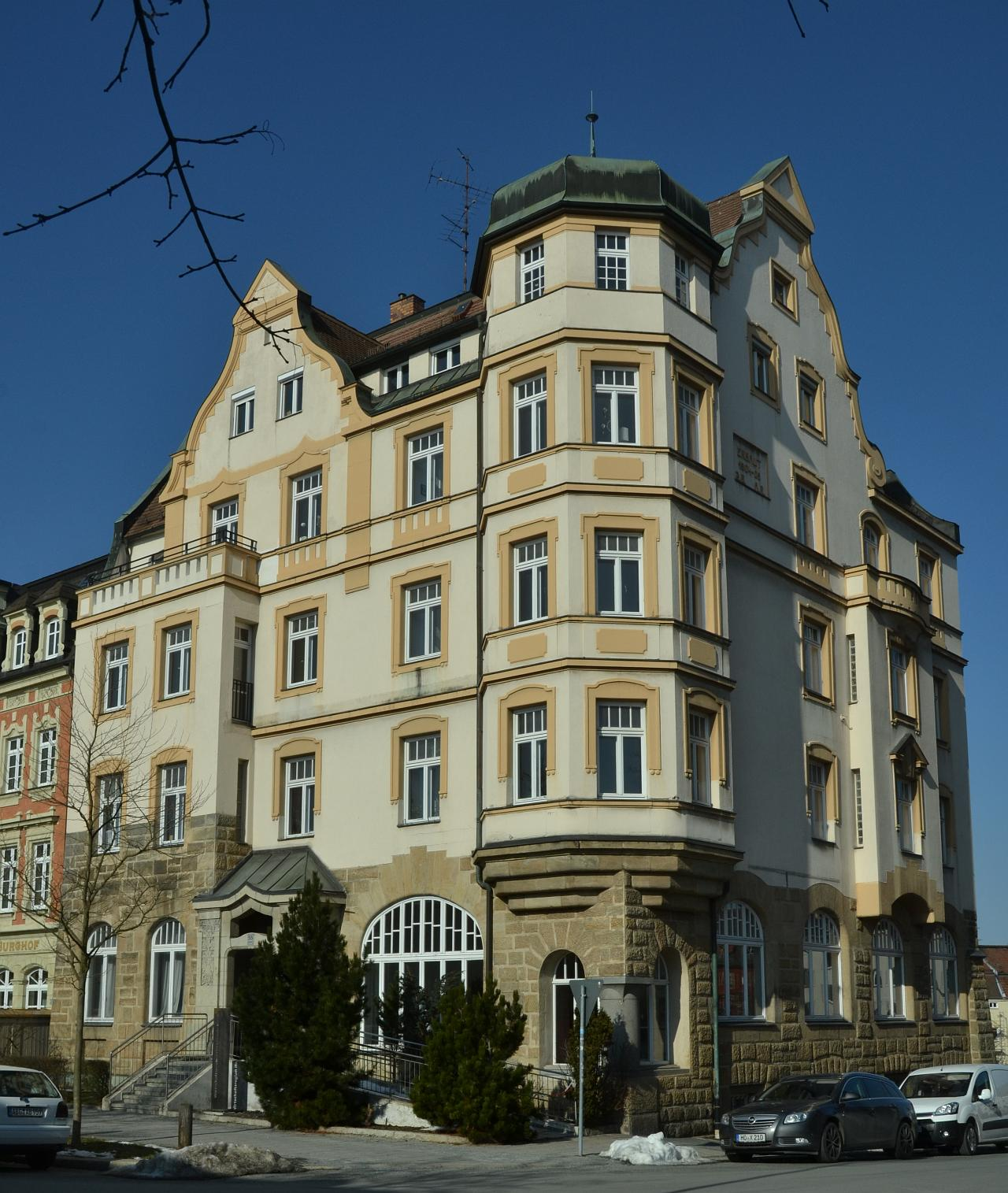 (siehe Dateiname)